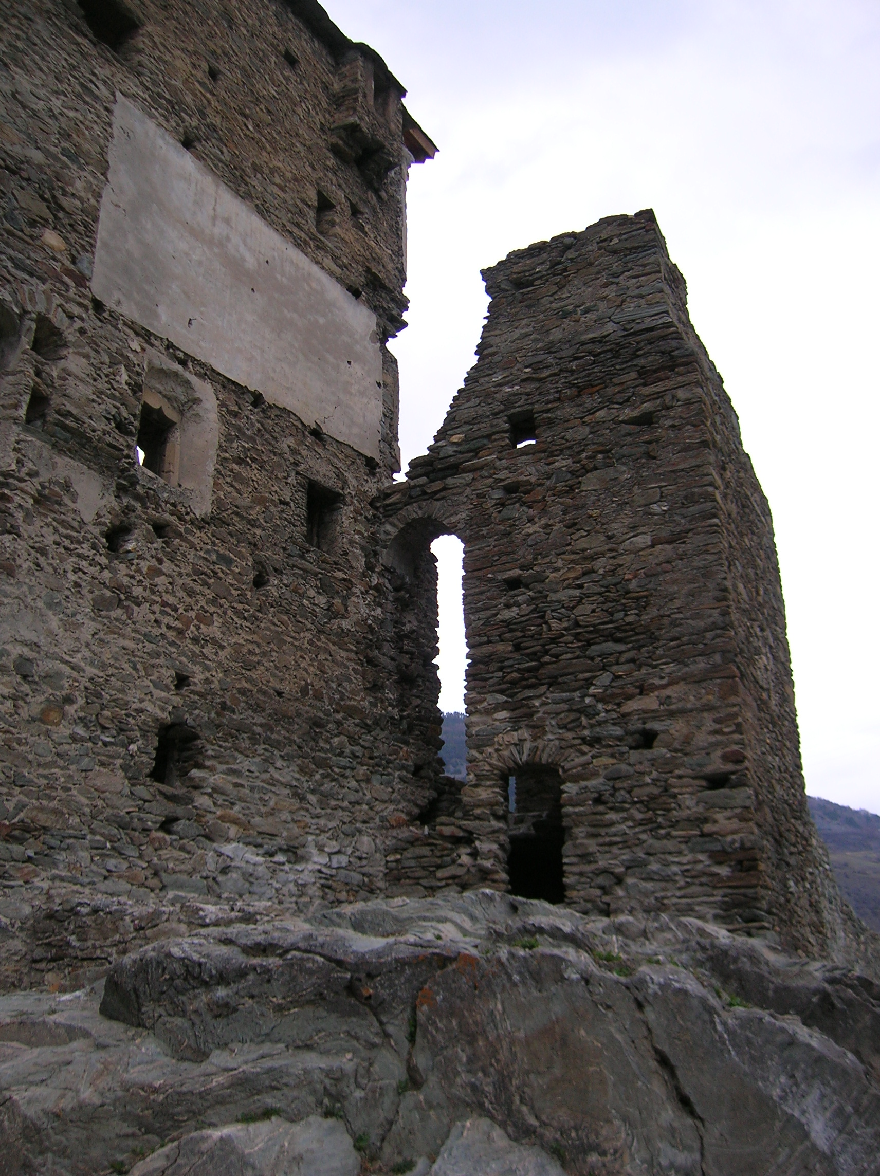 Castello La Mothe, Arvier, Valle d'Aosta, Italia.